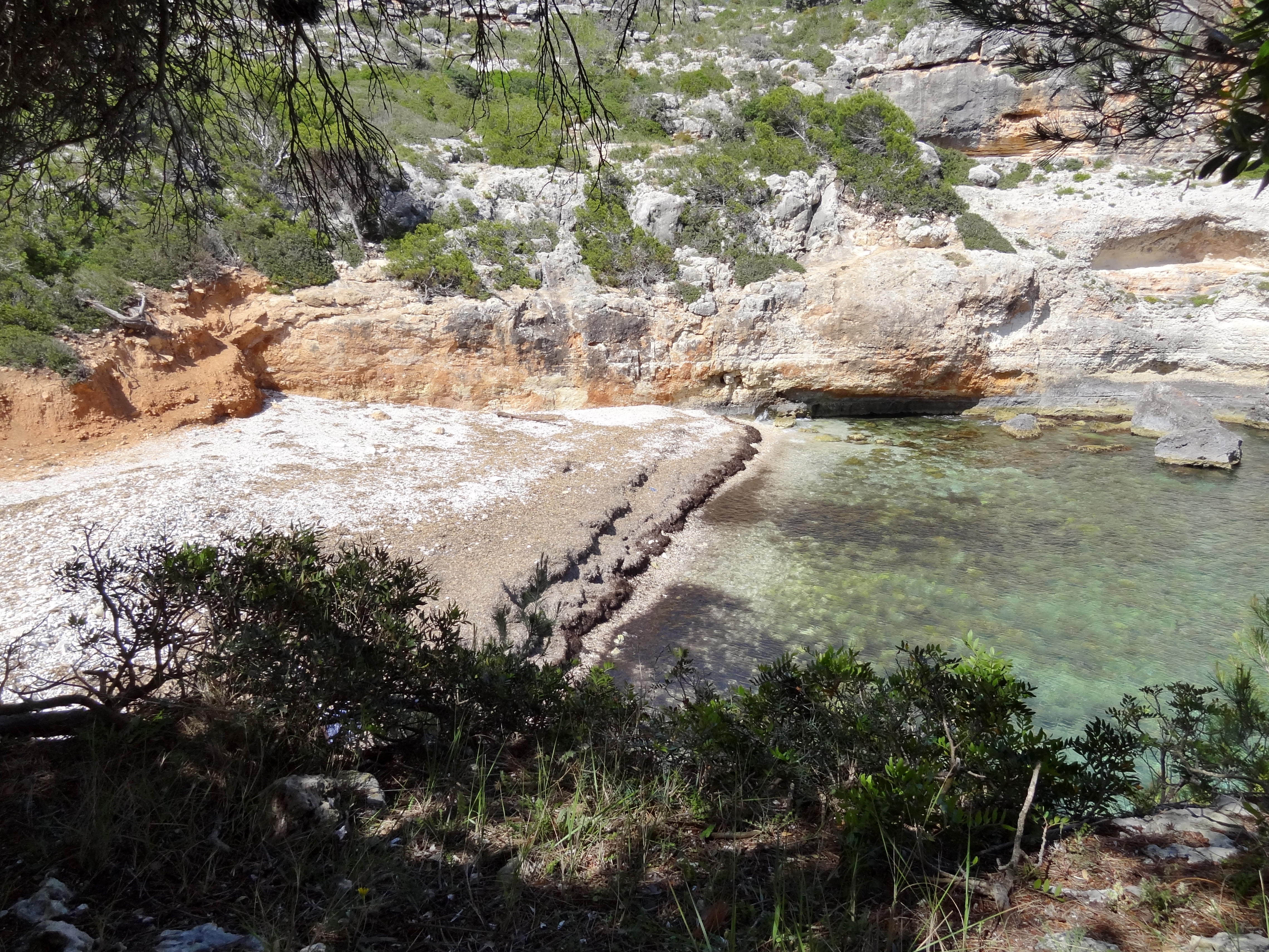 Cala Bóta, Gemeinde Manacor, Mallorca, Spanien